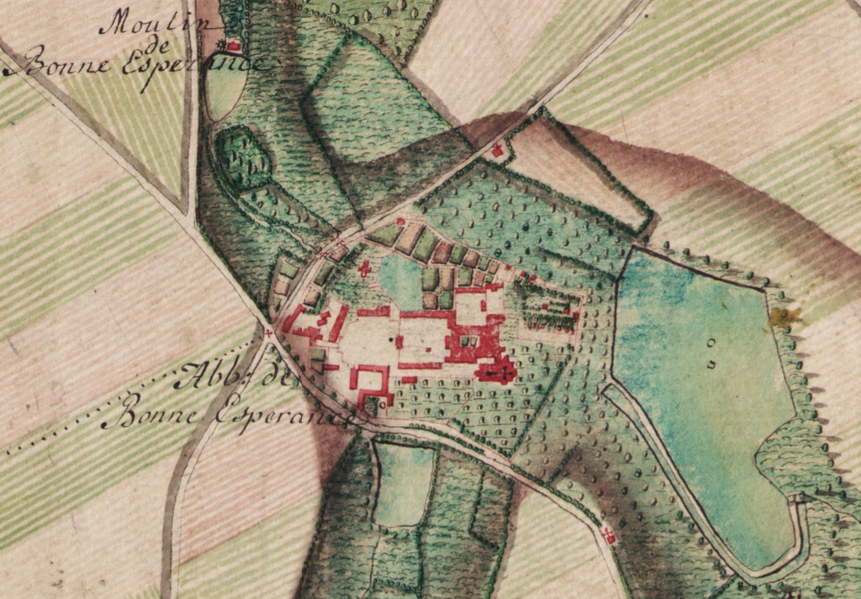 L'abbaye de Bonne-Espérance (Vellereille-les-Brayeux) sur la carte de Ferraris n° 66 (Merbes-le-Château).